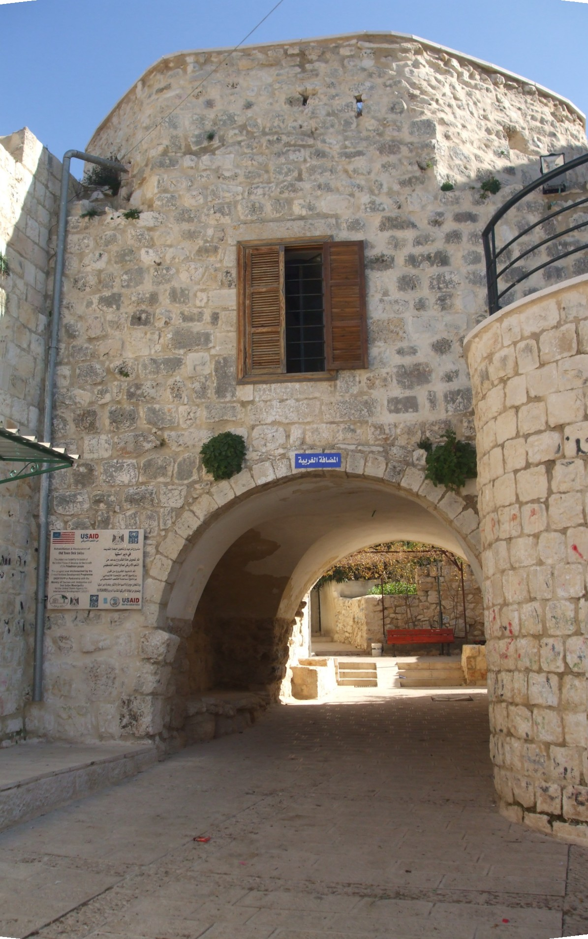 احدى بوابات البلدة القديمة